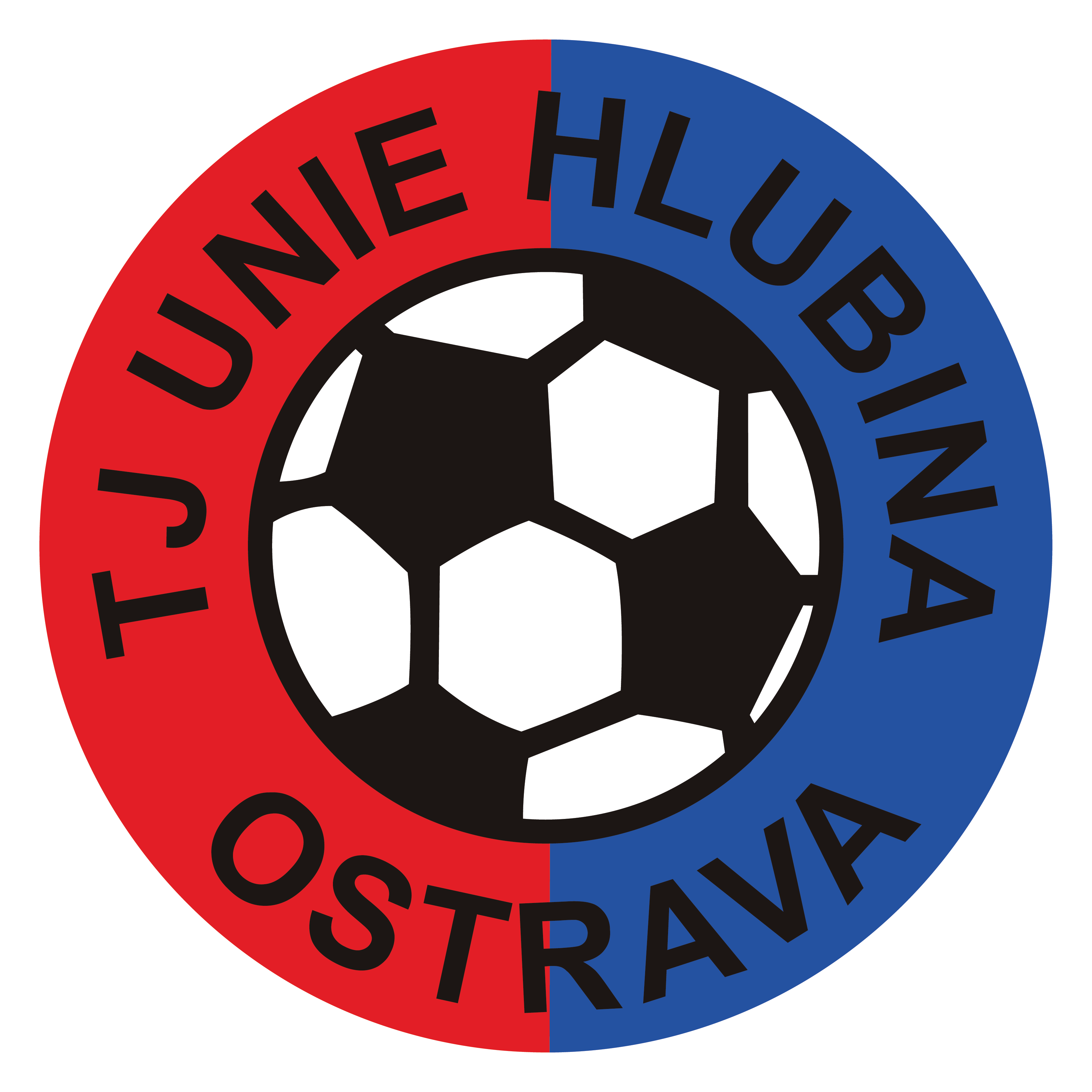 Logo TJ Unie Hlubina